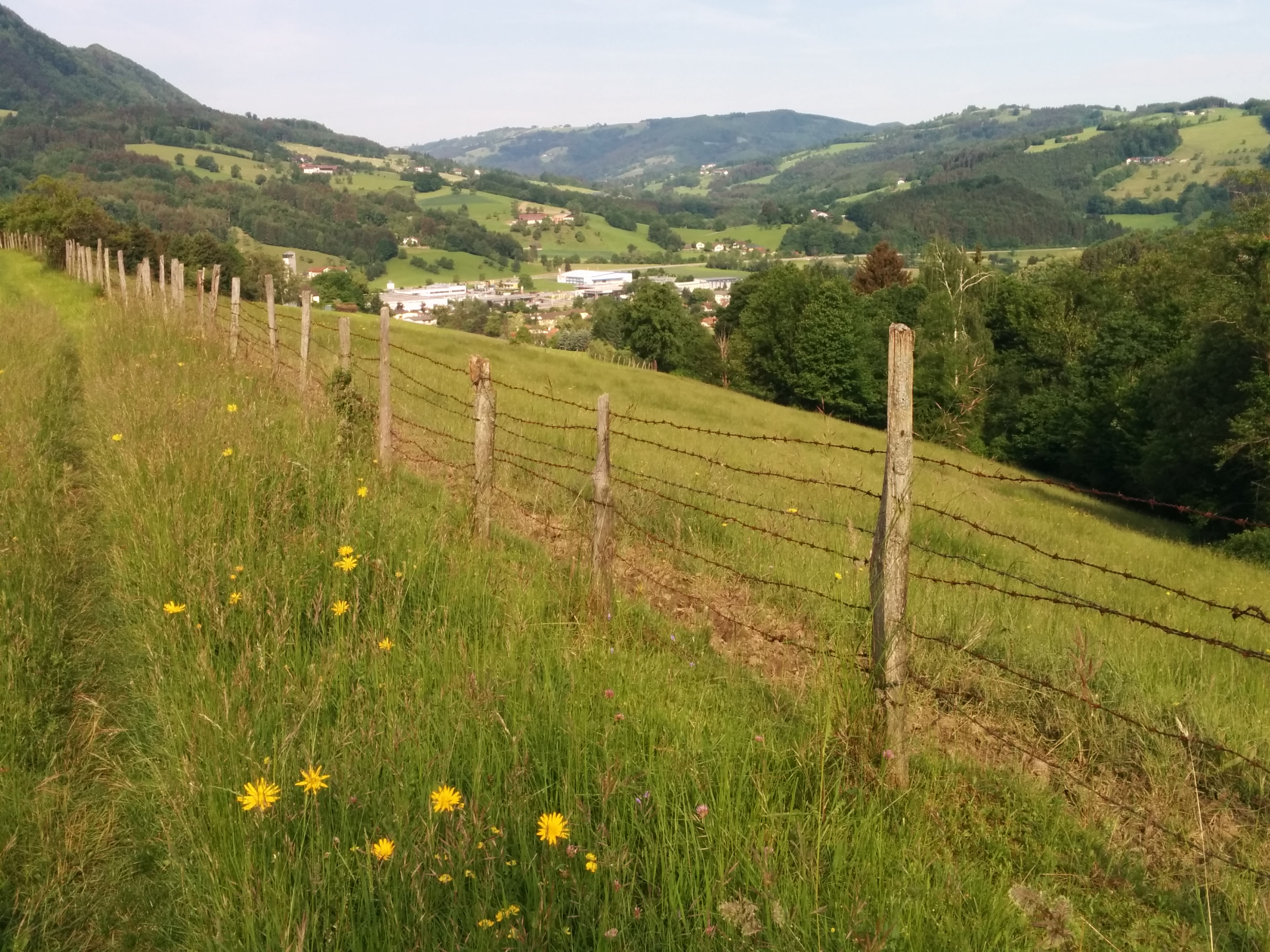 Blick auf Saffen vom Ginning